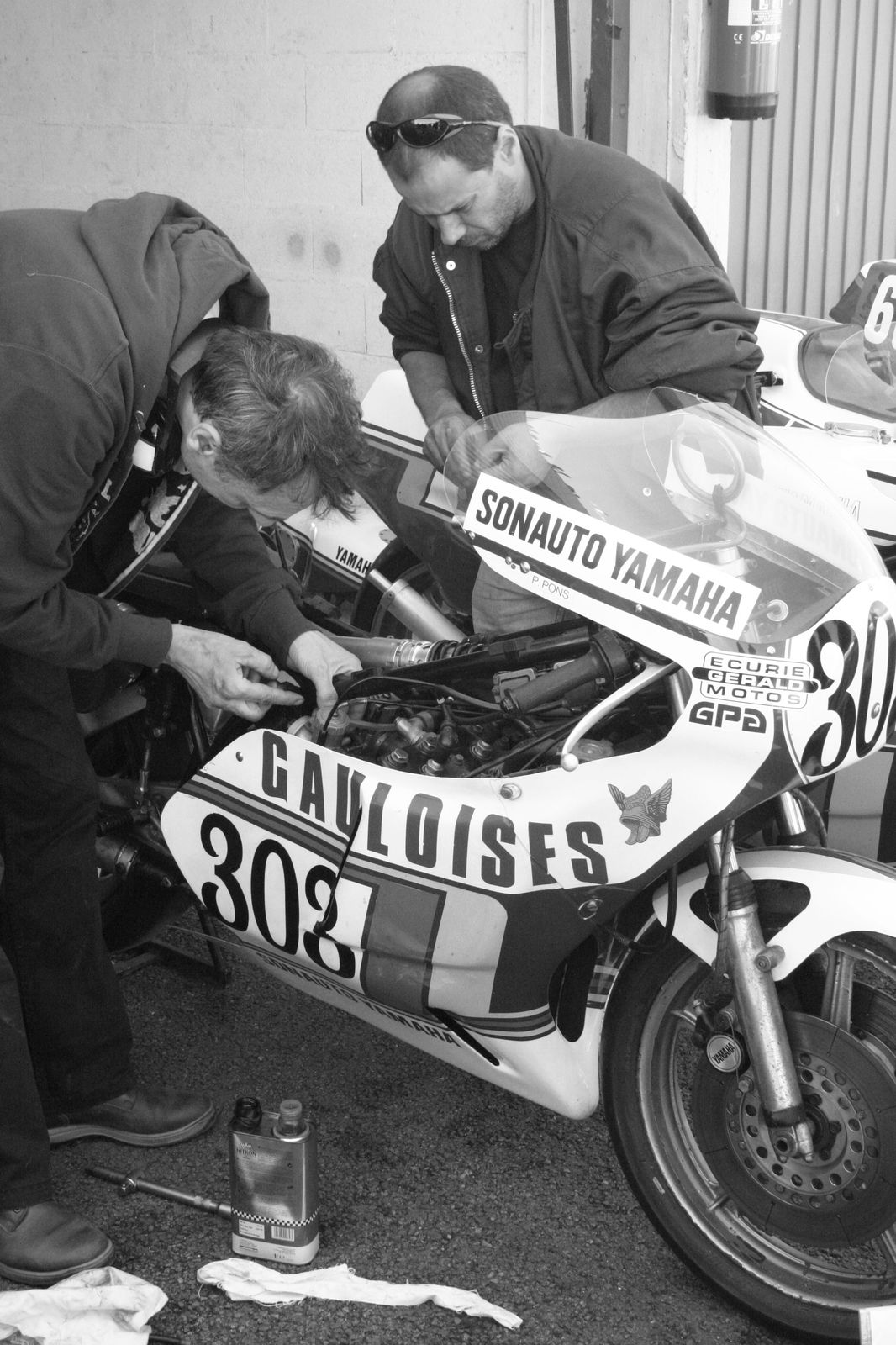 Yamaha TZ750